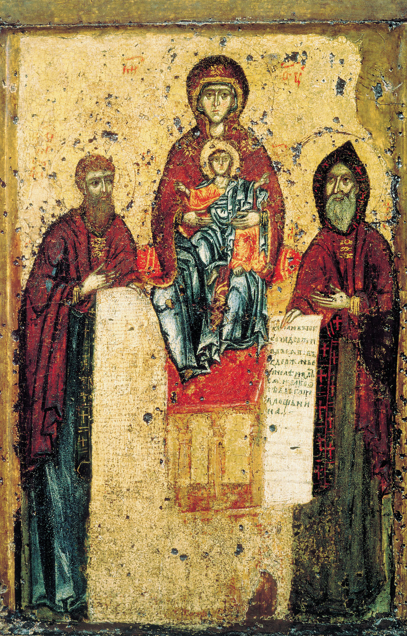 Богоматерь Печерская (Свенская) с преподобными Антонием и Феодосием Печерскими, Школа или худ. центр: Киев, 67 × 42 см, Государственная Третьяковская галерея, Москва, Россия. Происходит из Успенского Свенского монастыря на реке Свине близ Брянска. Икона Богоматери Печерской (Свенской) – древнейший памятник с изображением преподобных Антония и Феодосия Печерских. Преподобный Антоний (+1073) – основатель Киево-Печерского монастыря, учитель Феодосия. Преподобный Феодосий (+1074) – игумен Киево-Печерского монастыря, ввел общежительный монастырский устав. В «Сказании об иконе Богоматери Печерской» говорится о принесении в 1288 году по просьбе ослепшего брянского князя Романа (сына Михаила Черниговского) иконы Печерской Богоматери из Киевского Печерского монастыря на место, находящееся «в пяти поприщах от града Брянска» и о постройке на этом месте собора Свенского монастыря «чудесно прозревшим князем». Мнения исследователей в настоящее время расходятся – является ли данная икона списком с прославленной древней святыни или это сам первообраз.